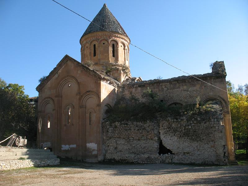 Deze Georgische kerk is gebouwd in de 8e eeuw, en is later vergroot in de 11e eeuw. De kerk is gelegen in het bergdorp İşhan (Georgisch: Ishkani), je kunt dit dorp alleen bereiken via een steile 6 kilometer lange weg omhoog. Schitterend